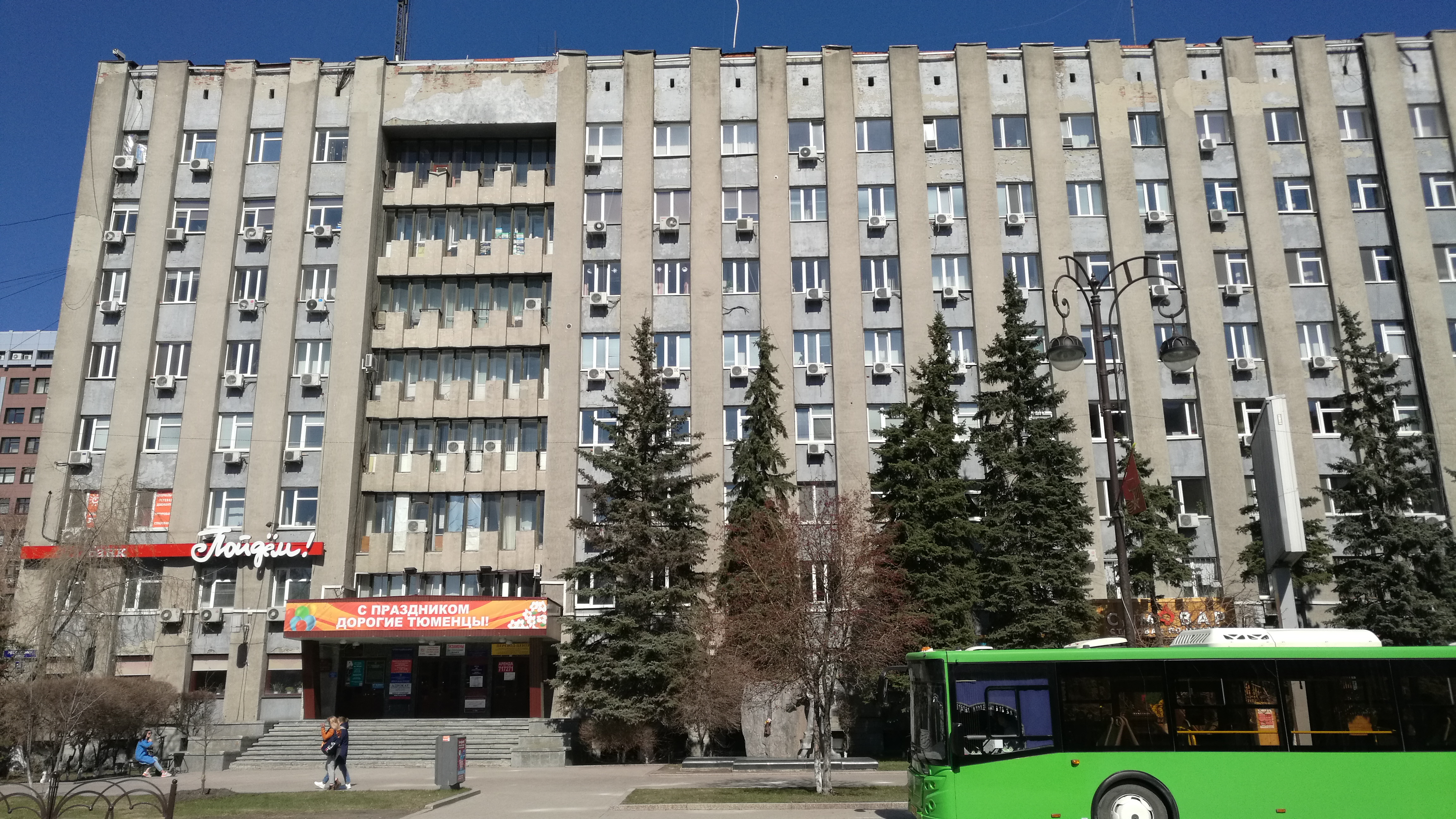 Glavtjumengeologija. Tjumeno, Rusio.